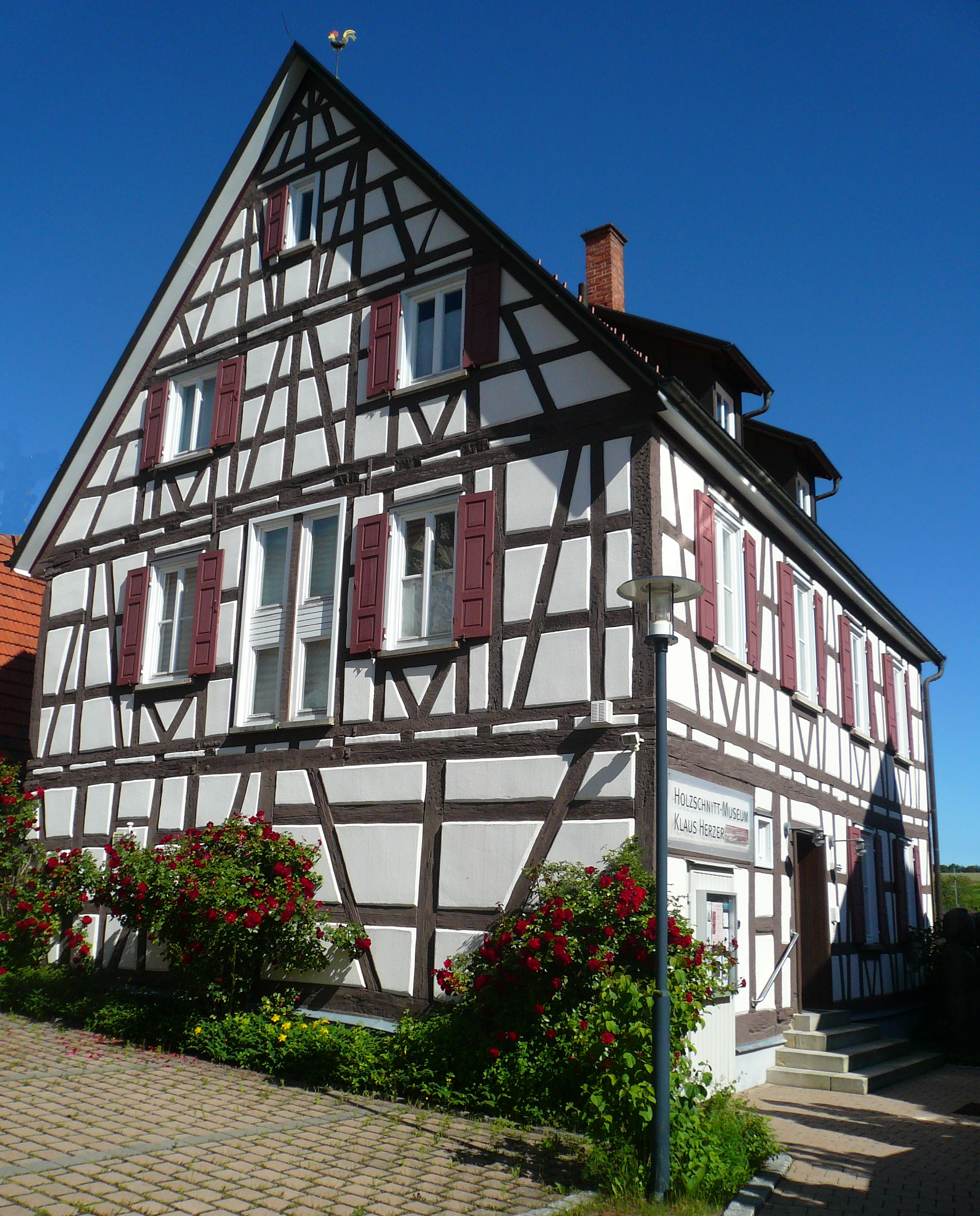 Das Holzschnitt-Museum Klaus Herzer in Mössingen-Öschingen